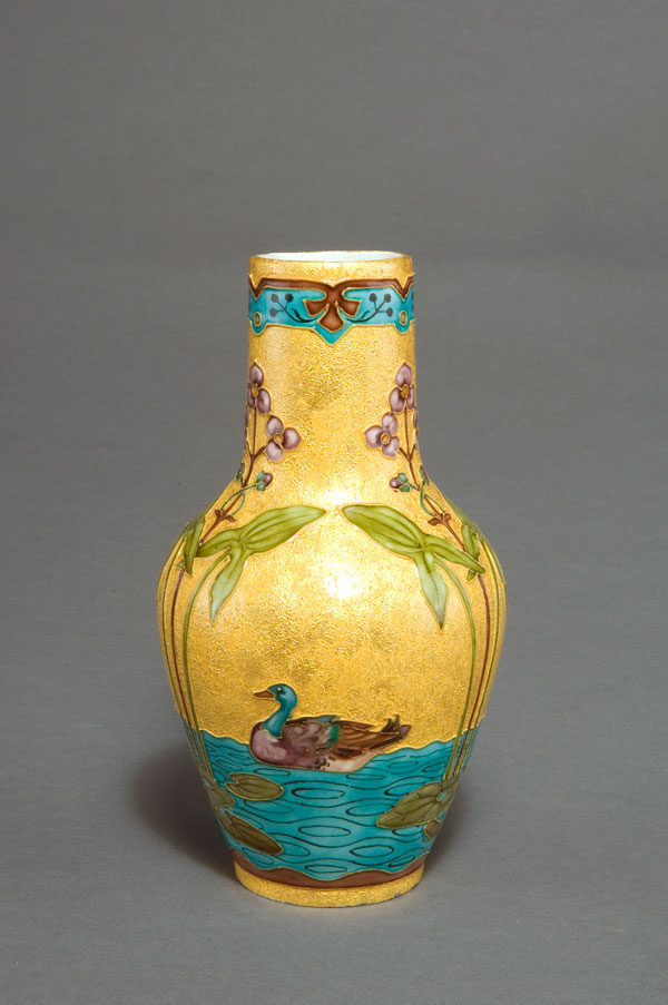 Travail de Félix Optat Milet